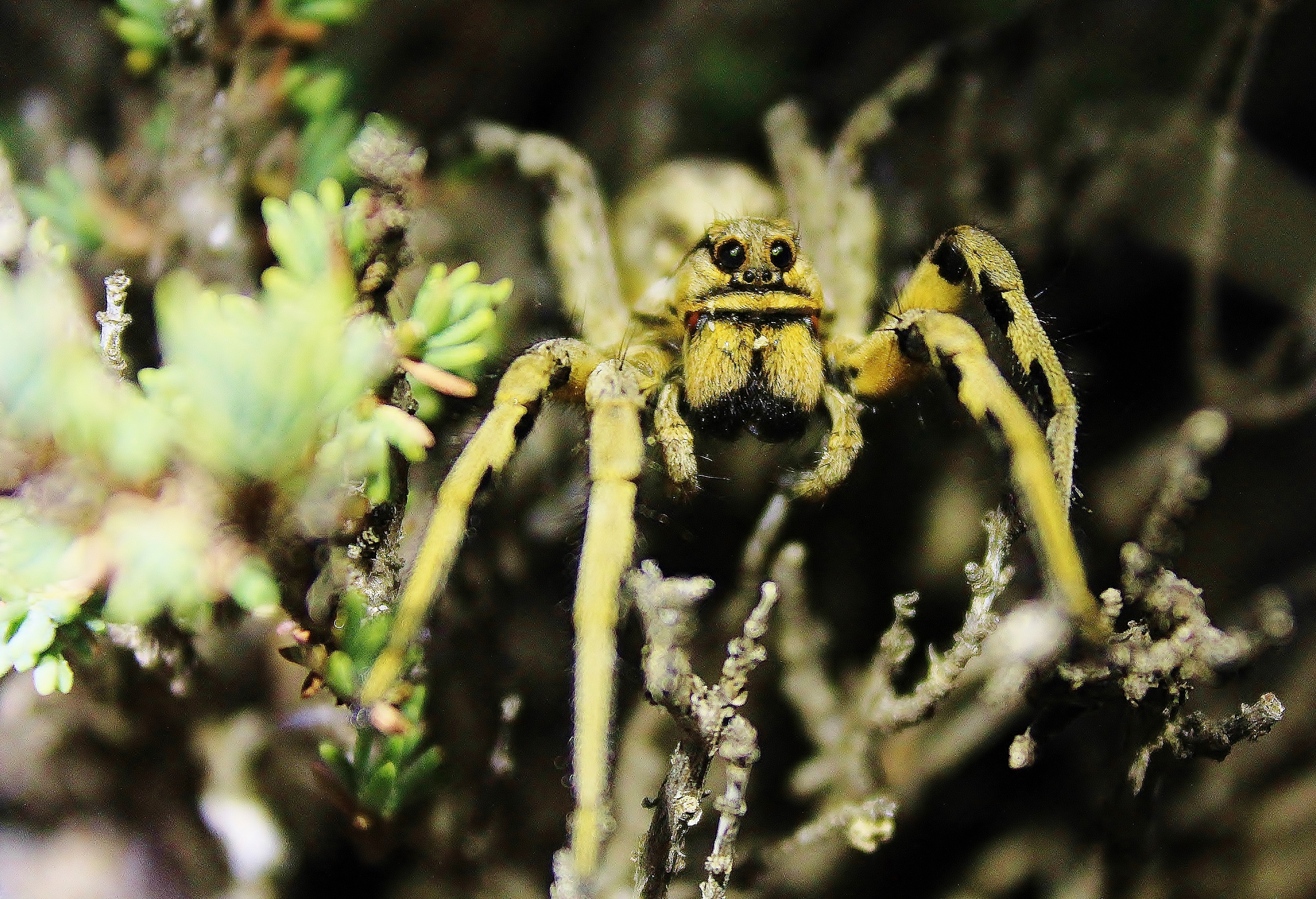 Hembra adulta de Lycosa hispanica, en la Sierra de Chinchilla (Albacete).